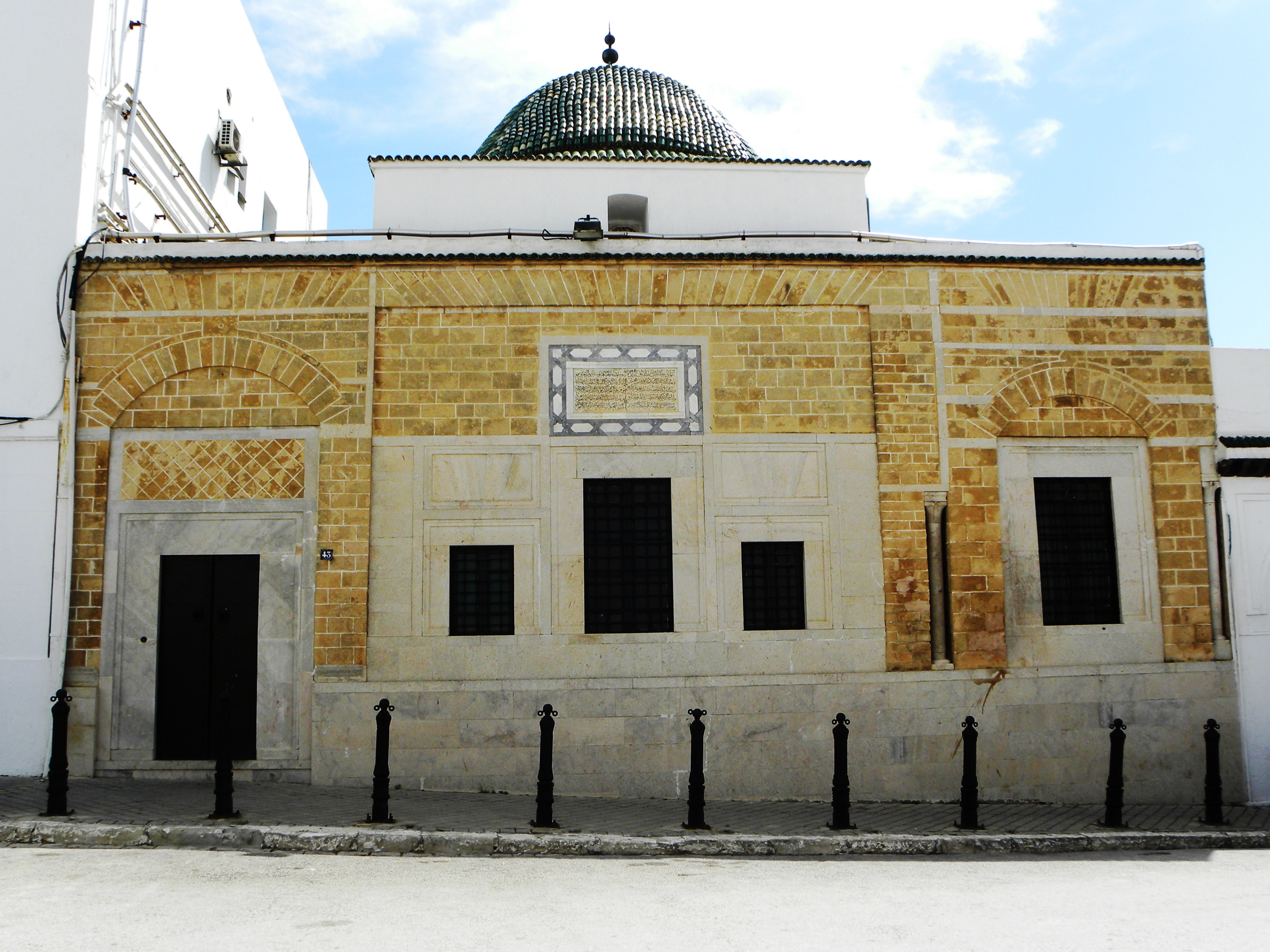 Vue extérieure de la Torba (Mausolée) de Ahmed Khouja Dey, mitoyenne à Dar el Bey, à l'entrée du souk El Bechmak